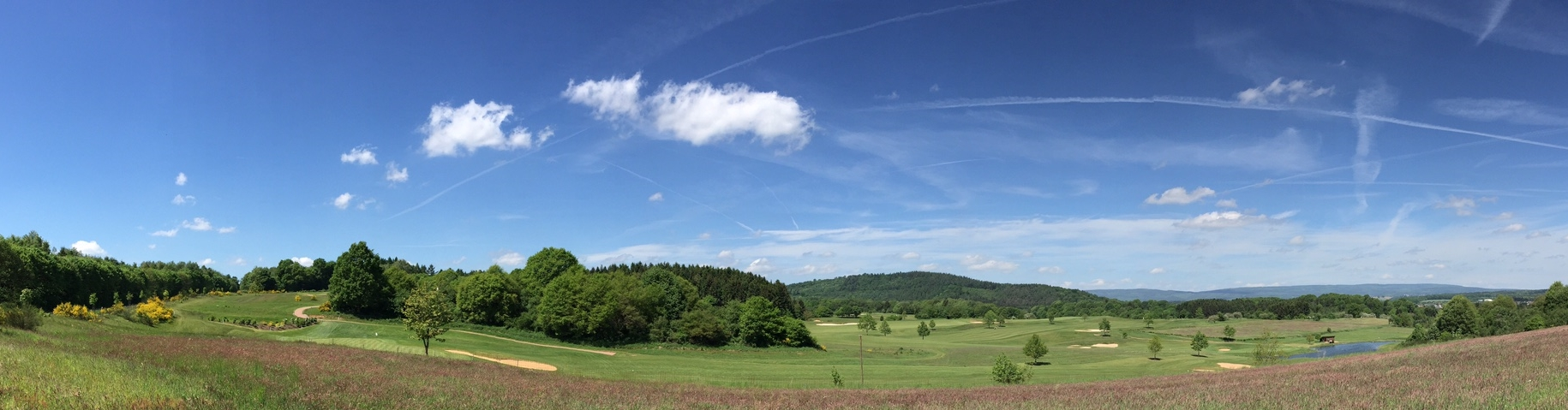 Panoramaansicht Golfpark Nunkirchen